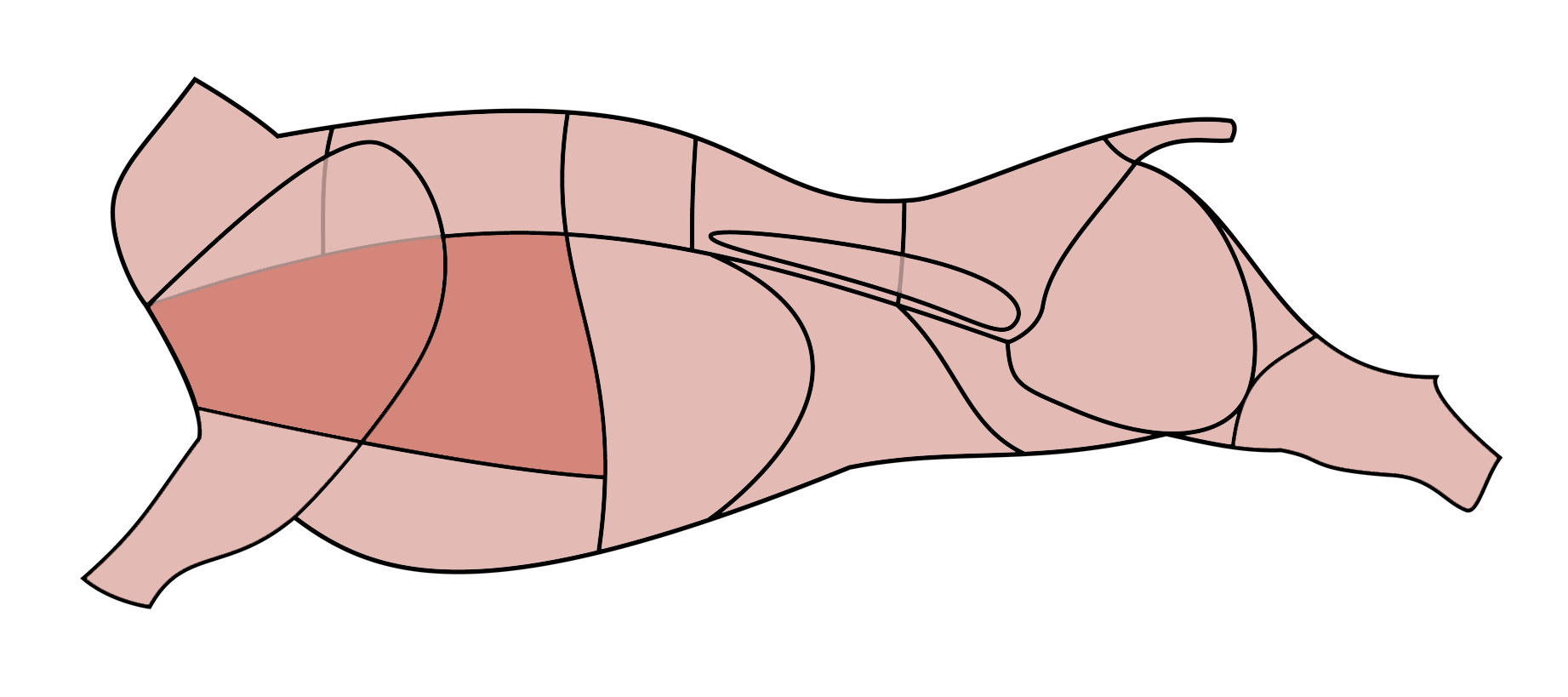 Querrippe des Rinds